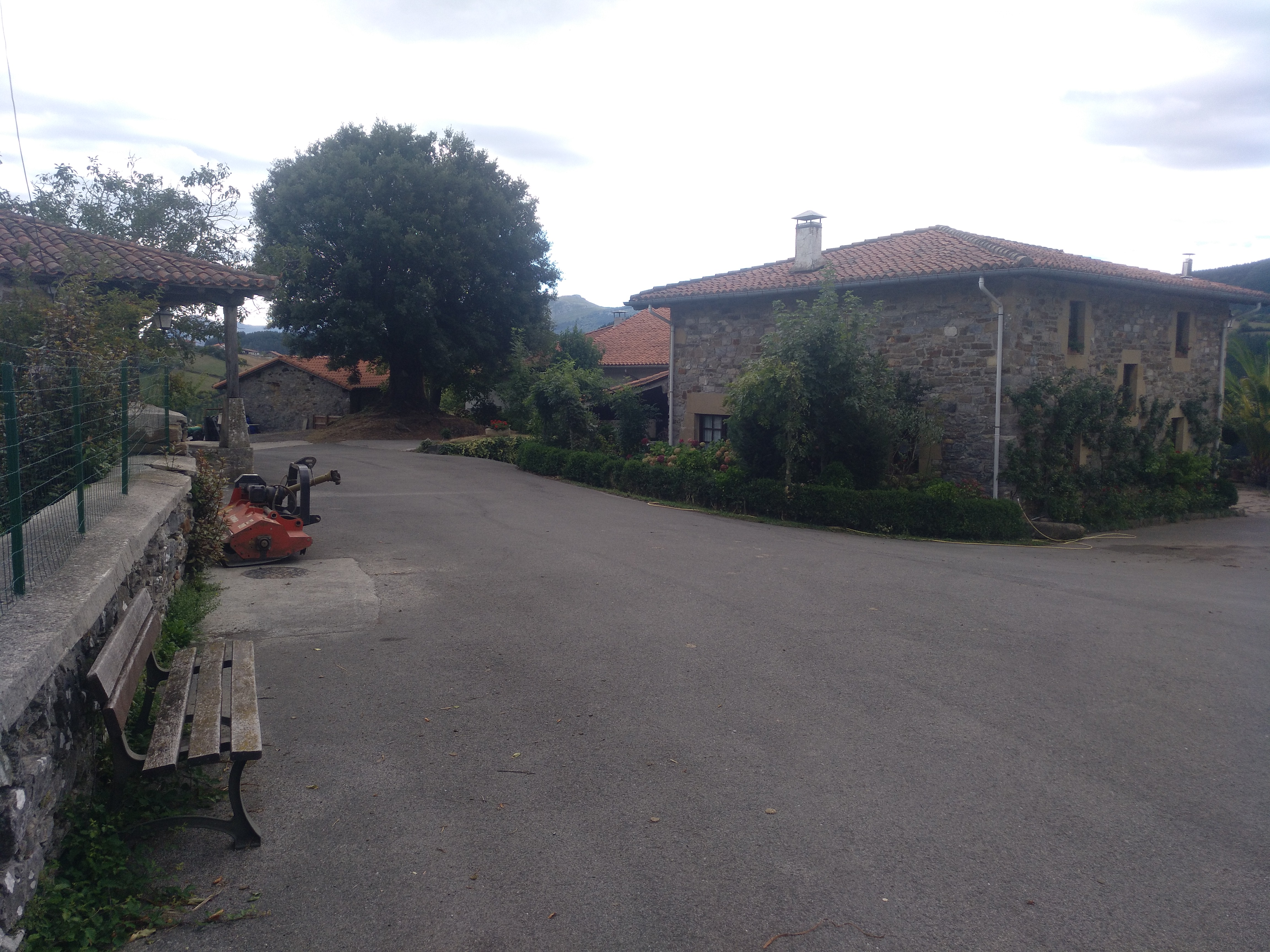 Arraga auzoa Aramaio udalerrian